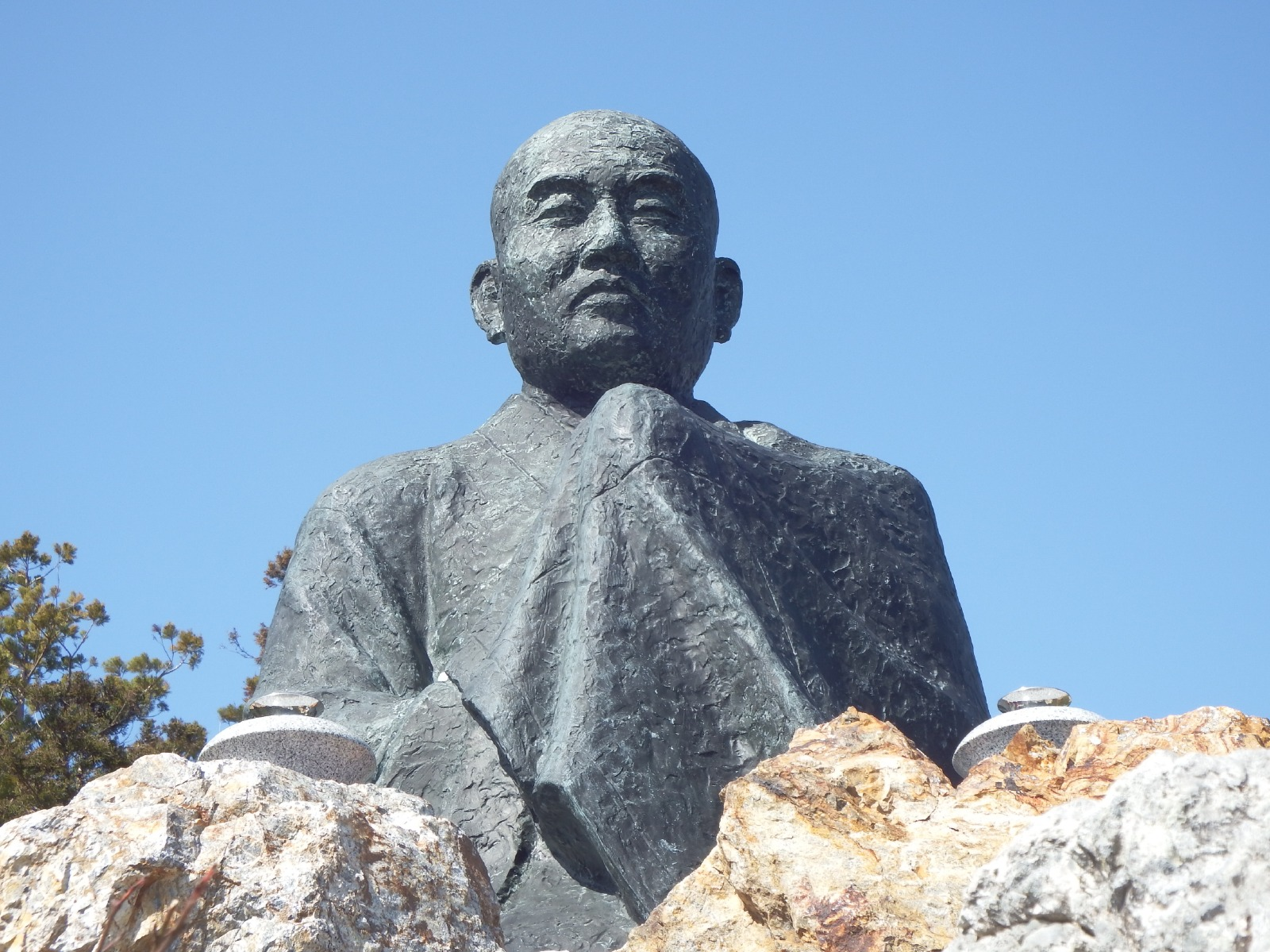 太龍寺の大師像